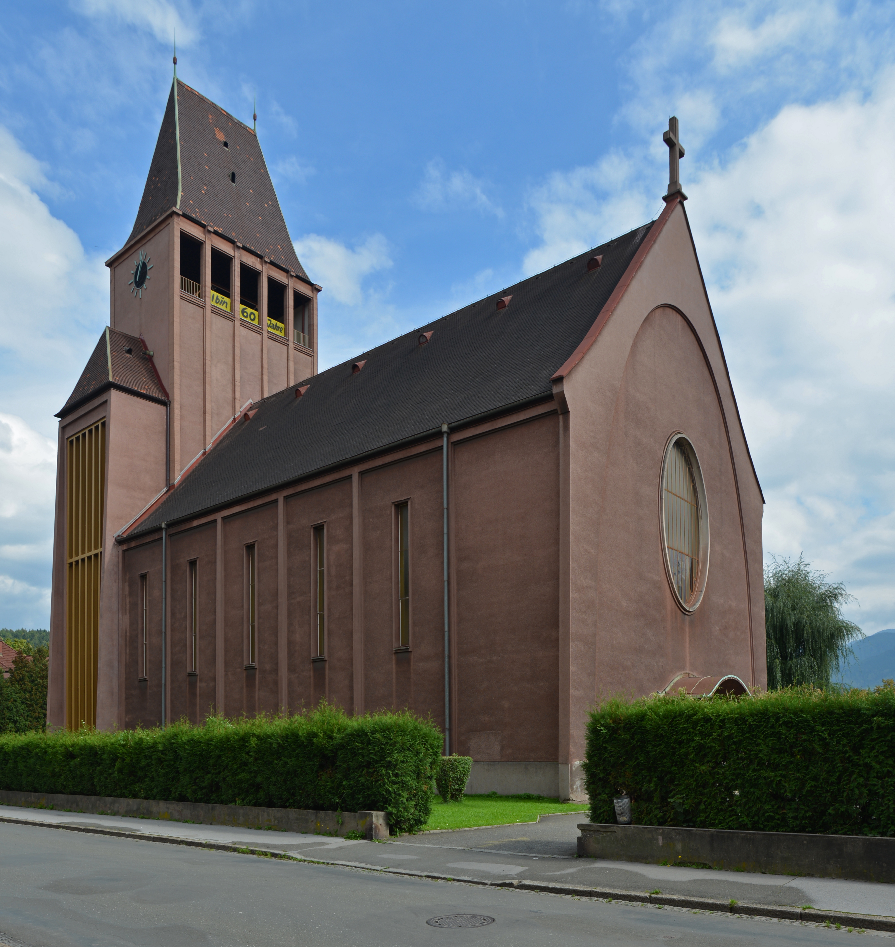 Kath. Pfarrkirche hl. Josef, Mesnerhaus und Pfarrhof